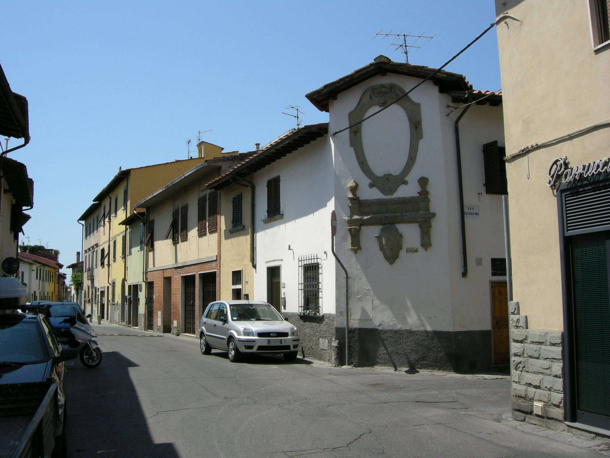 Via di peretola